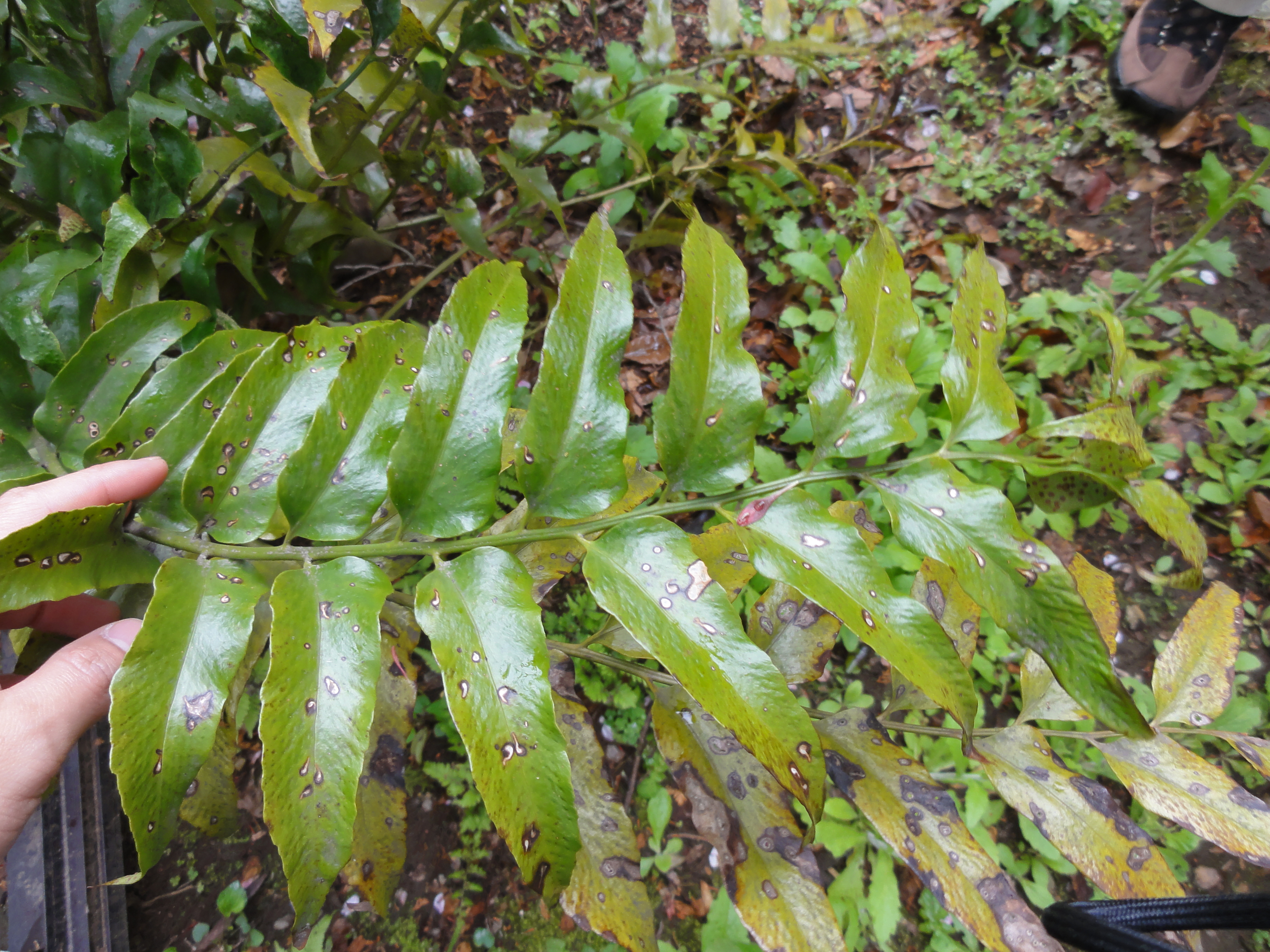 テリハヤブソテツ[照葉藪蘇鉄][Cyrtomium laetevirens (Hiyama) Nakaike]-葉全体